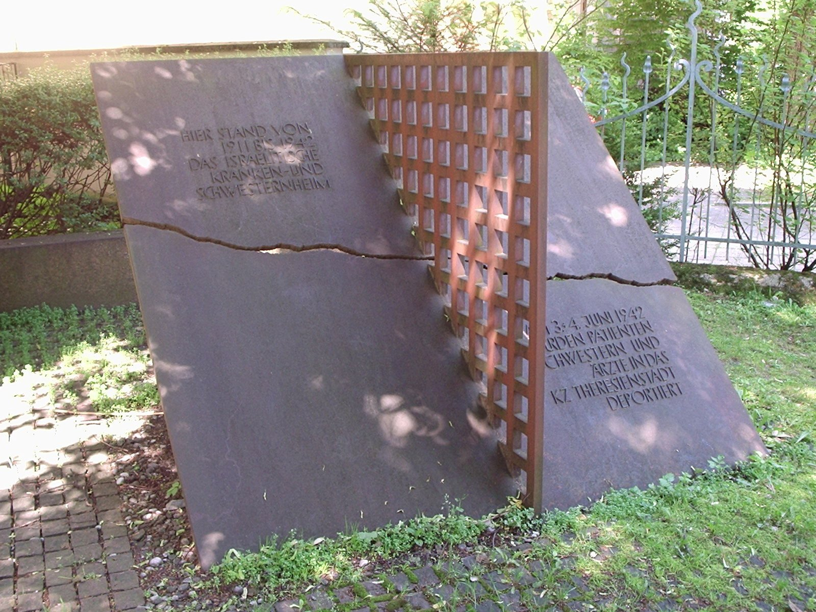 Mahnmal für das ehemalige Israelitische Kranken- und Schwesternheim an der Hermann-Schmid-Straße in München.